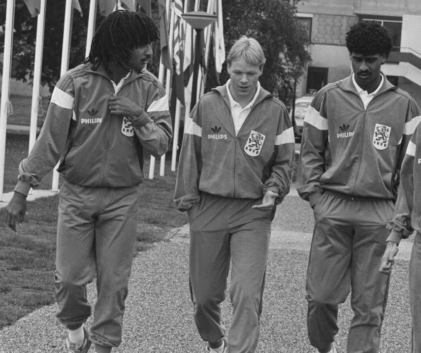 Nederlands Elftal op Papendal; vlnr Ruud Gullit, Ronald Koeman en Frank Rijkaard